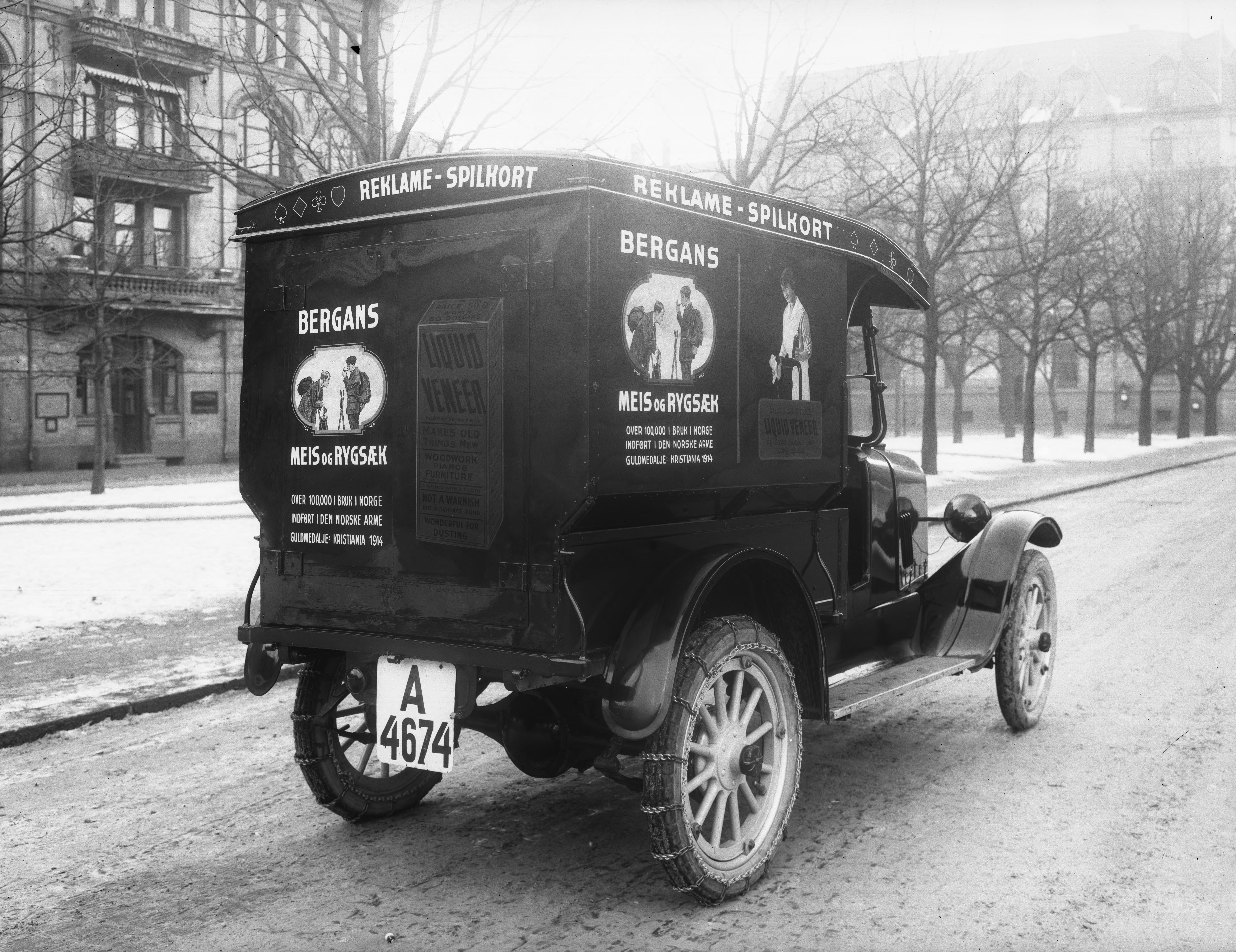 Bildet er hentet fra Nasjonalbibliotekets bildesamling. Anmerkninger til bildet var: Påskrift arkivark: Sverre Young Eldste arkivnummer: 706 Oslo, Oslo, Oslo